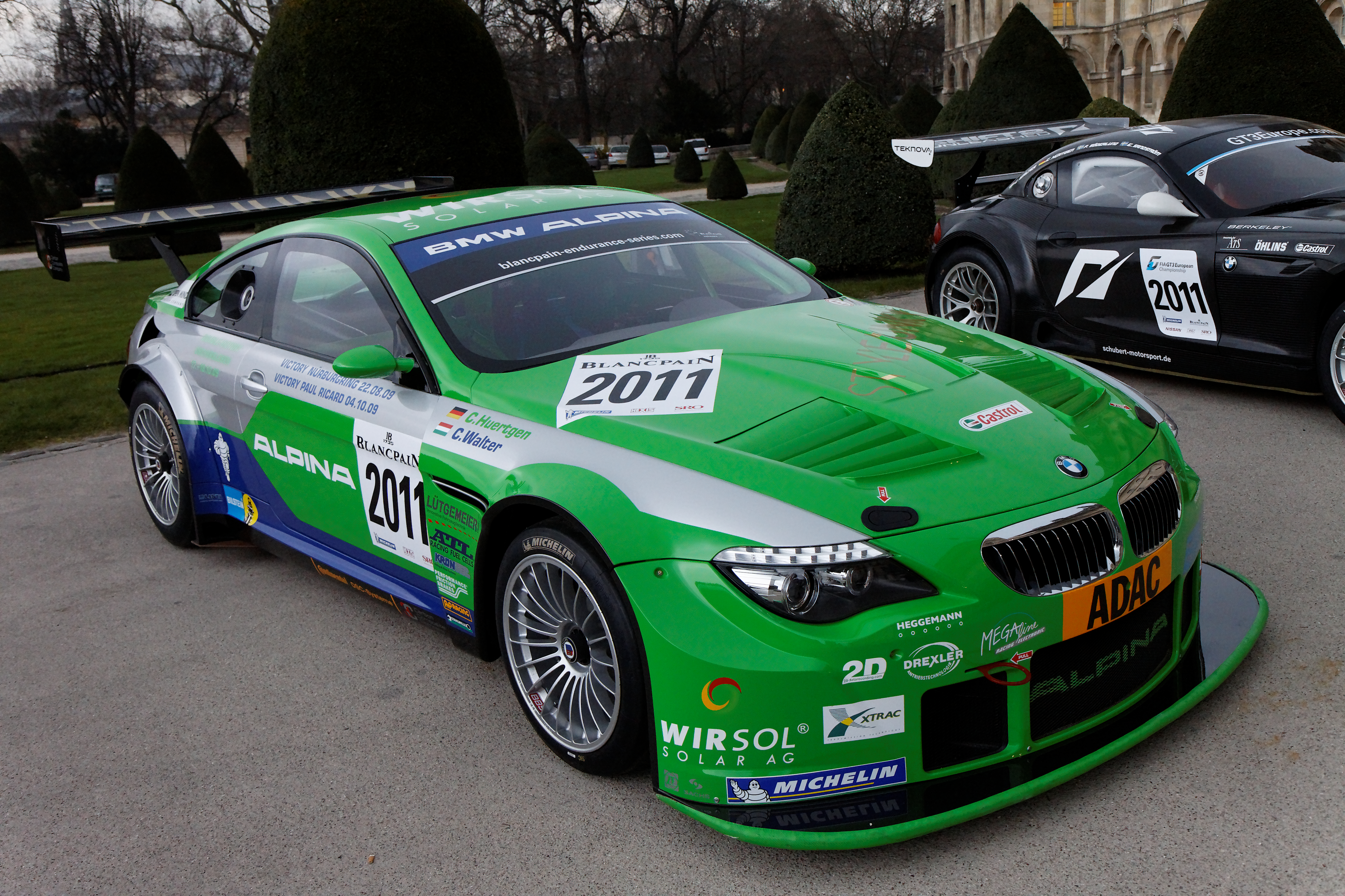 Photographie prise lors de la présentation du Blancpain Endurance series aux Invalides à Paris en mars 2011.